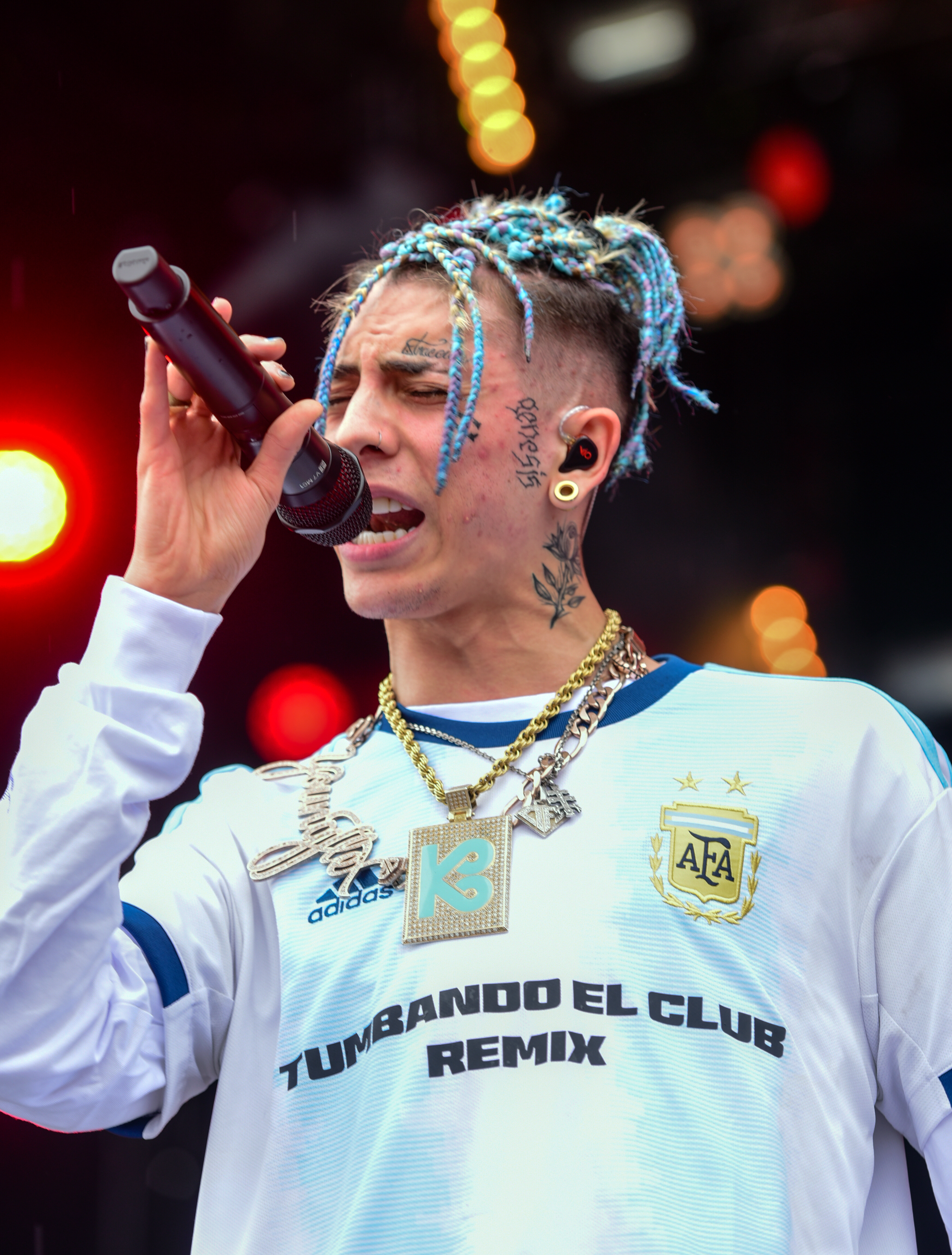 Khea live auf dem Openair Frauenfeld 2019